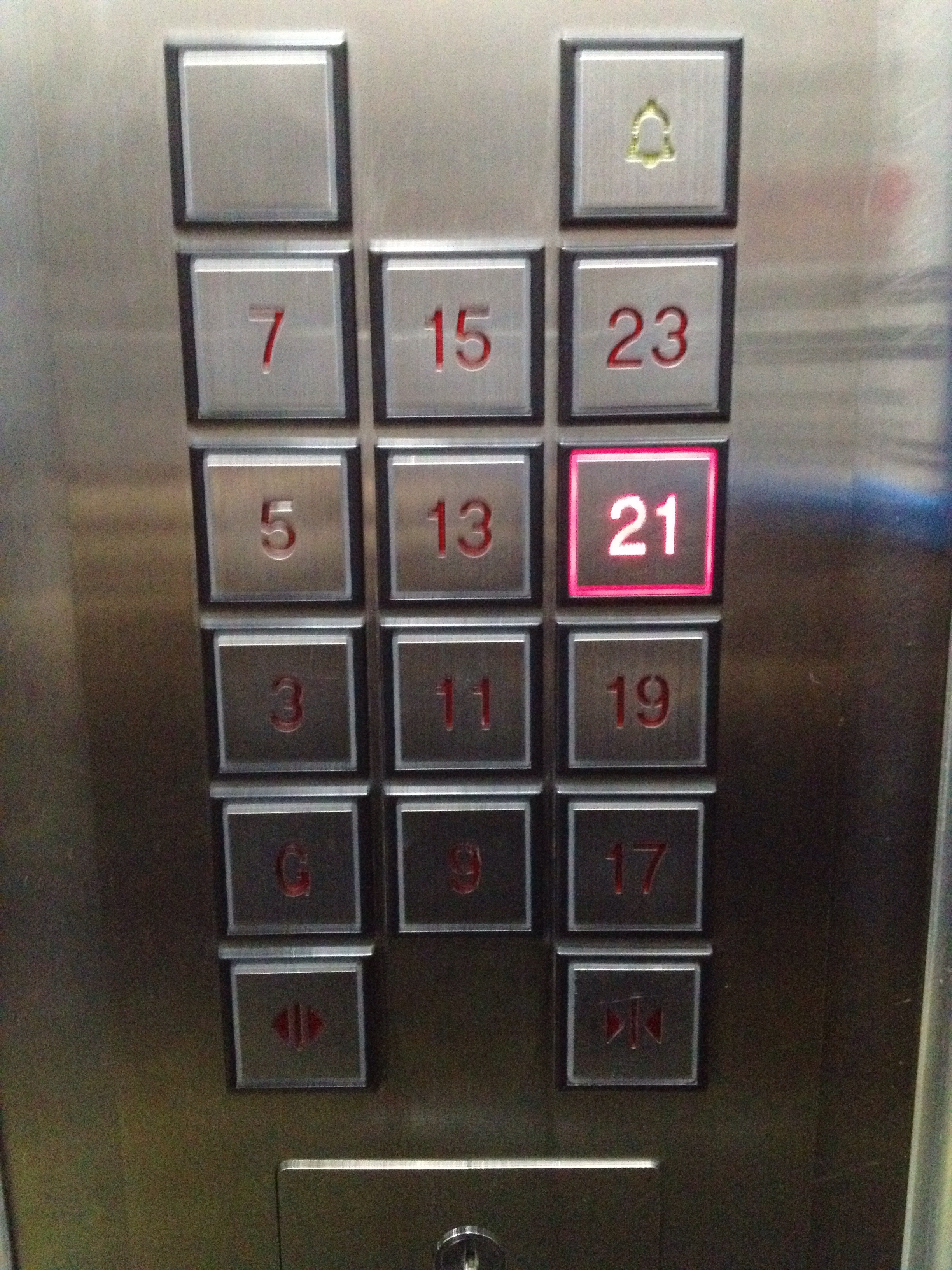 以前最高住10樓，多數係10樓以下。今次係住得最高一次，望落街有啲驚。